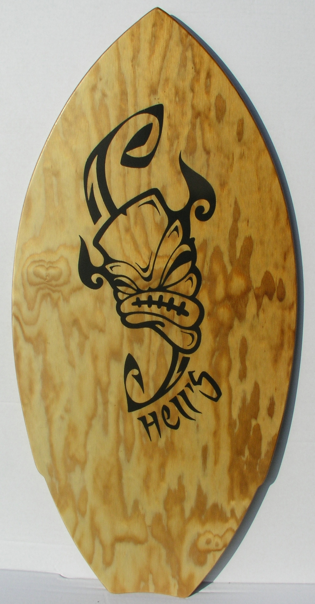 Skimboard en bois, de 108x51cm